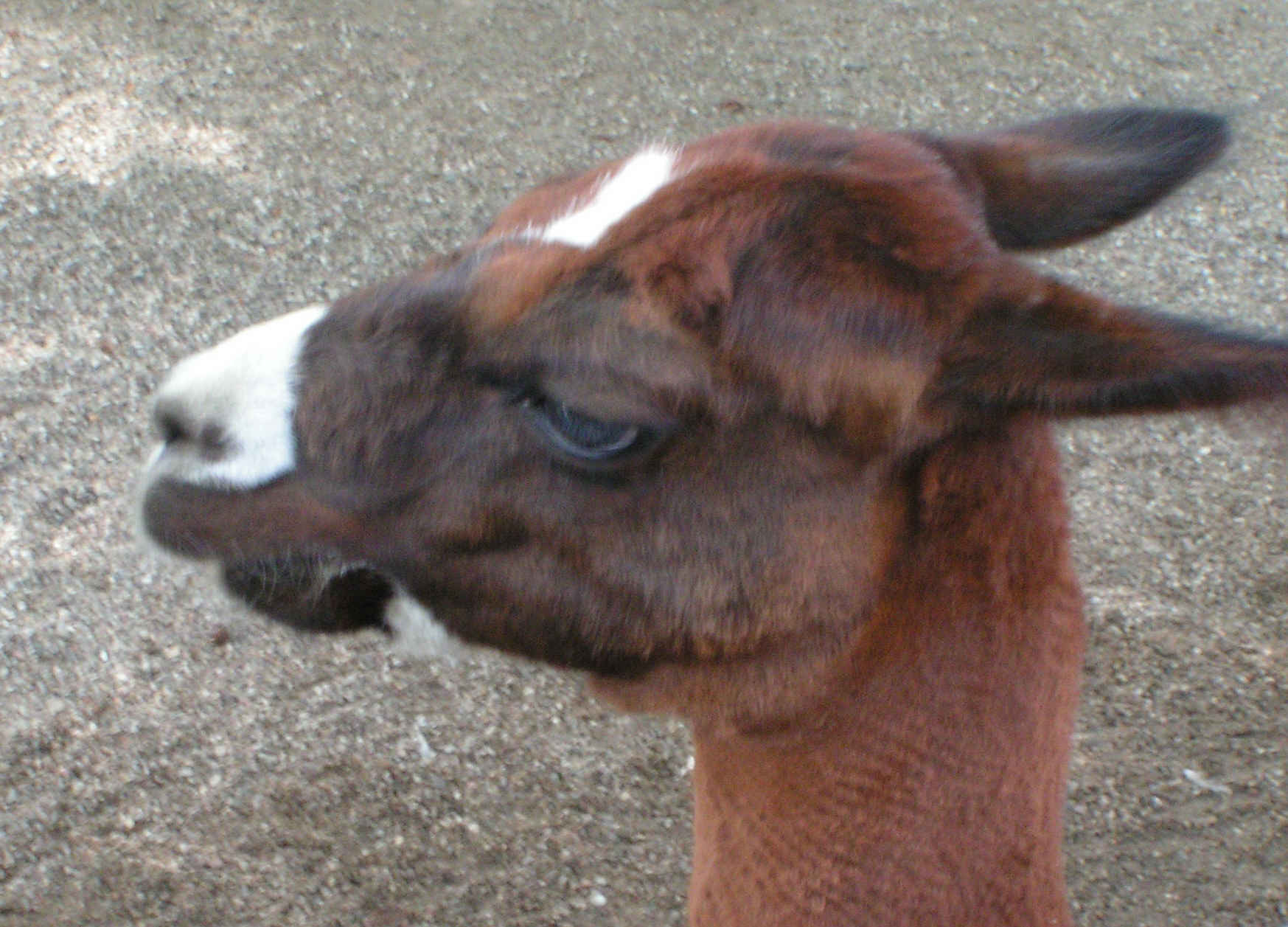 Kopf eines Alpakas in Hagenbecks Tierpark, Hamburg